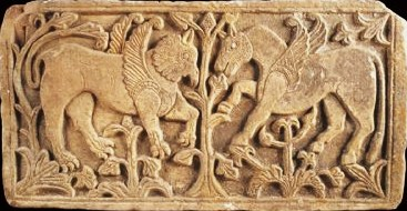 Pluteo di età mediobizantina con grifo e pegaso. Museo archeologico nazionale di Cagliari